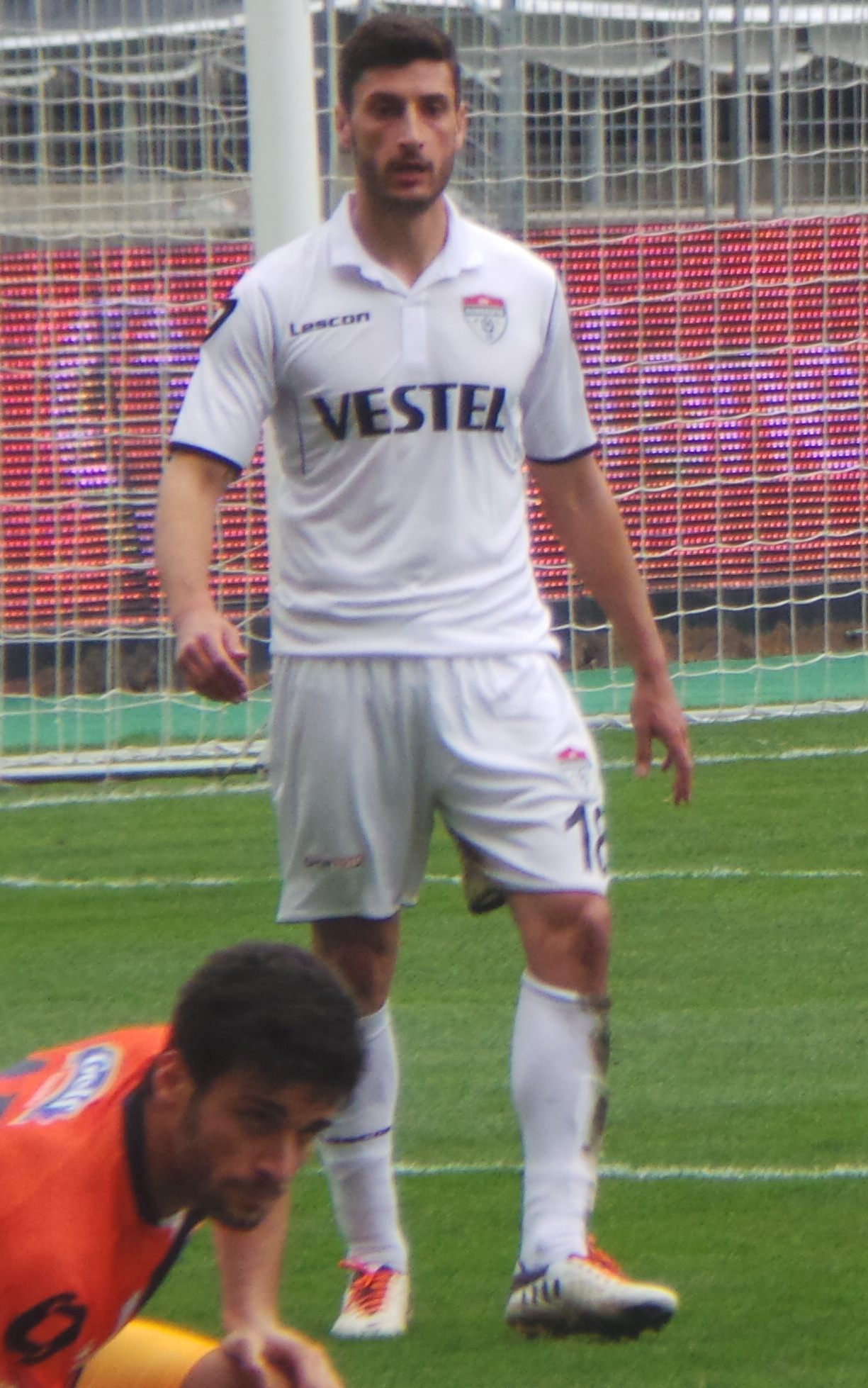 Benjamin Fuchs